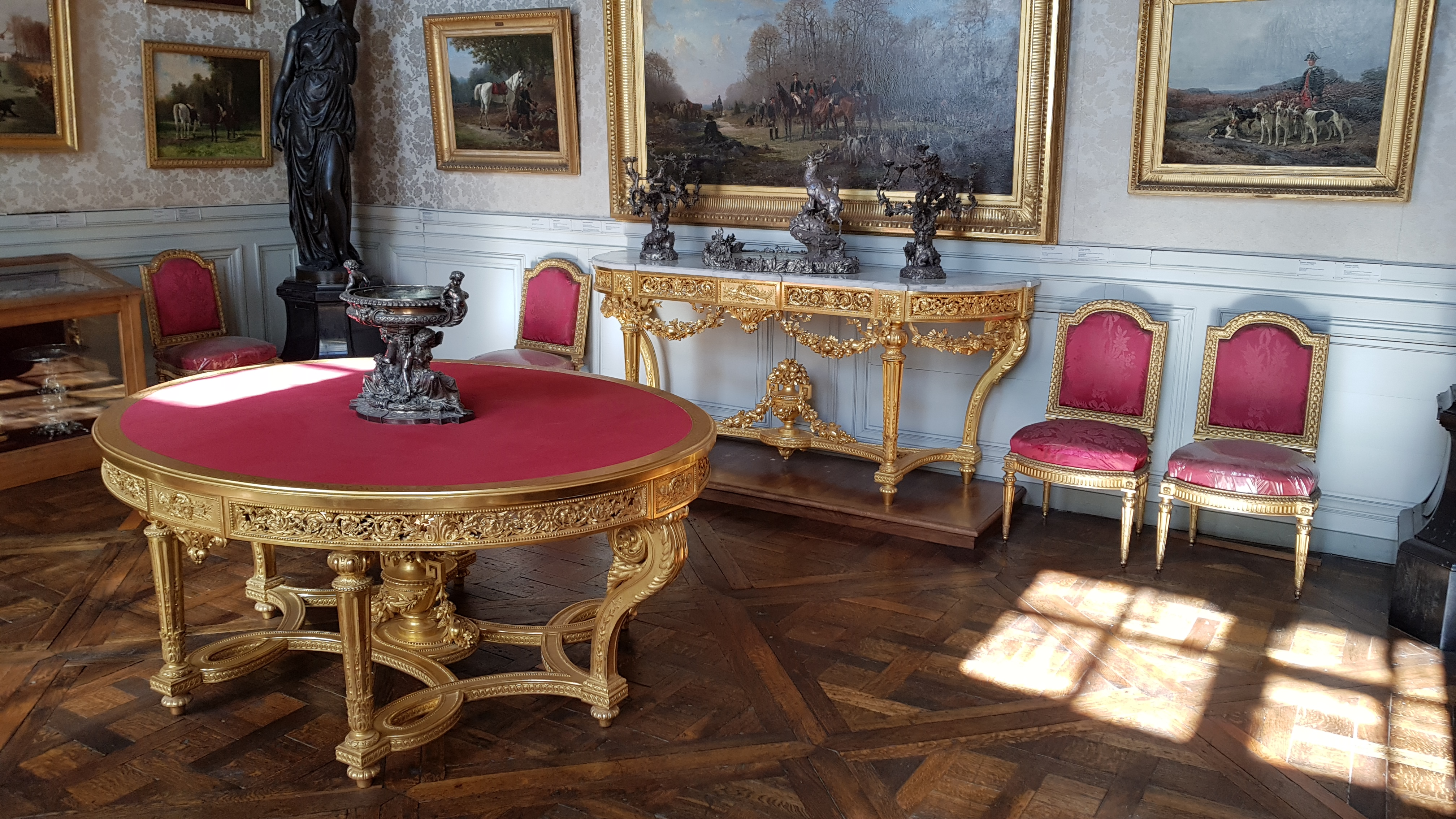 Une table, une console et cinq chaise de style Louis XVI. Bois sculpté et doré, marbre blanc (console), garniture de damas de soie rouge (chaises). Second Empire, forme un ensemble. D'un ensemble entré en blanc a Compiègne en 1858 pour le salon de réception de l'appartement A; marbre entré en 1859; ensemble envoyé à dorer par l'Impératrice en 1869.